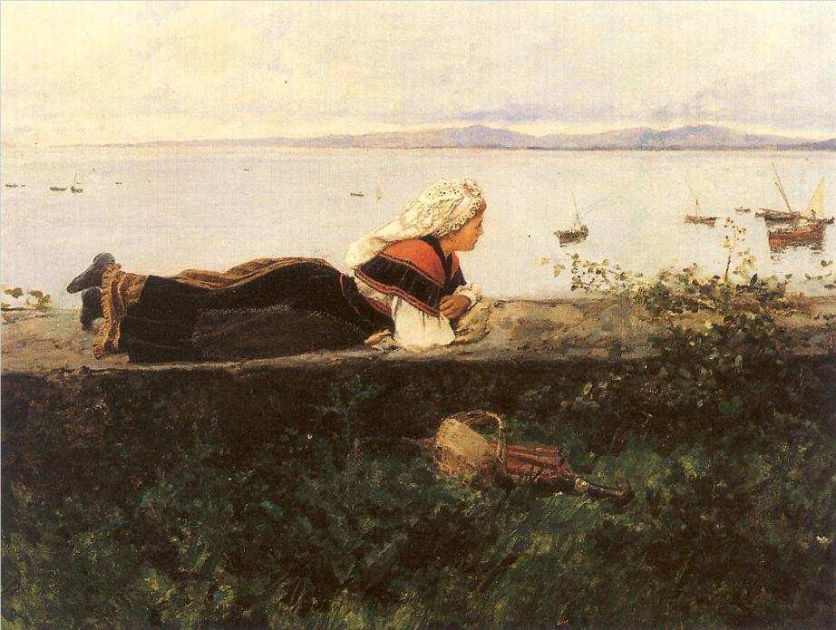 Paisaje con gallega